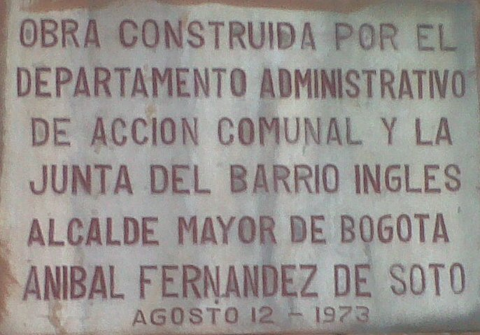 Descripción de la obra del salón comuanl del barrio Ingles